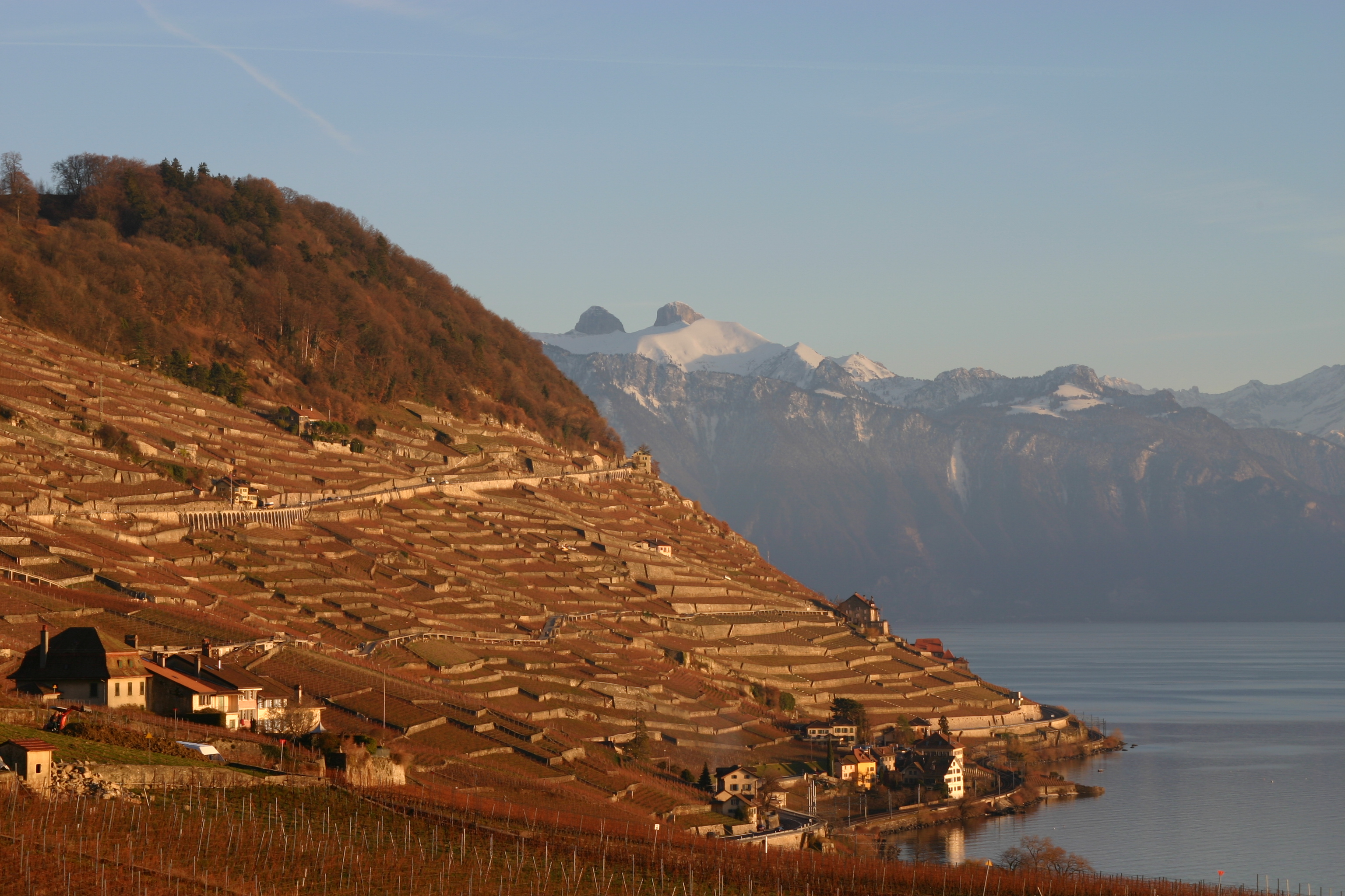 Epesses - Vignoble en terrasse de Lavaux.